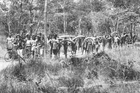 Porteurs d'Ivoire, :fr:Congo, 1910